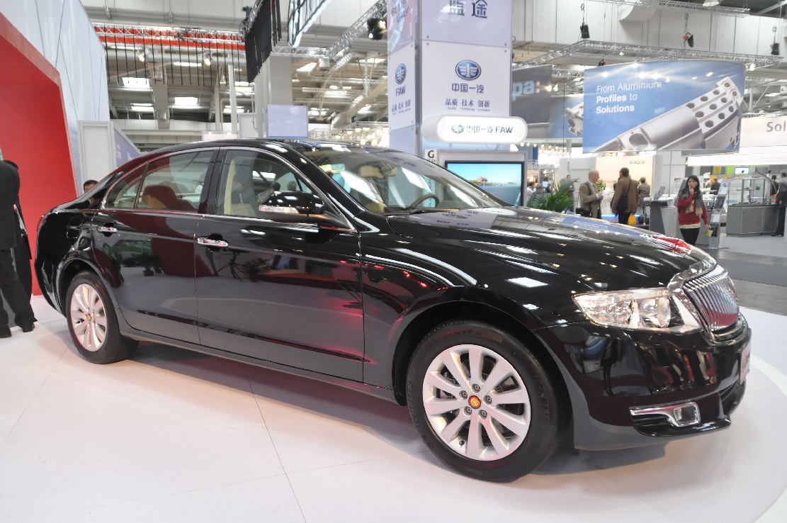 Hannover-Messe April 2012 Dieses Foto entstand durch die Mithilfe des gemeinnützigen Vereins Skillshare bei der Akkreditierung als Fotograf. Infos unter skillshare.eu Skillshare e.V. ist ein eingetragener gemeinnütziger Verein zur Förderung der Bildung durch Unterstützung der Erstellung, Sammlung und Verbreitung so genannten freien Wissens. IBAN: DE16 8306 5408 0004 8850 66 BIC: GENODEF1SLR Bank: VR-Bank Altenburger Land